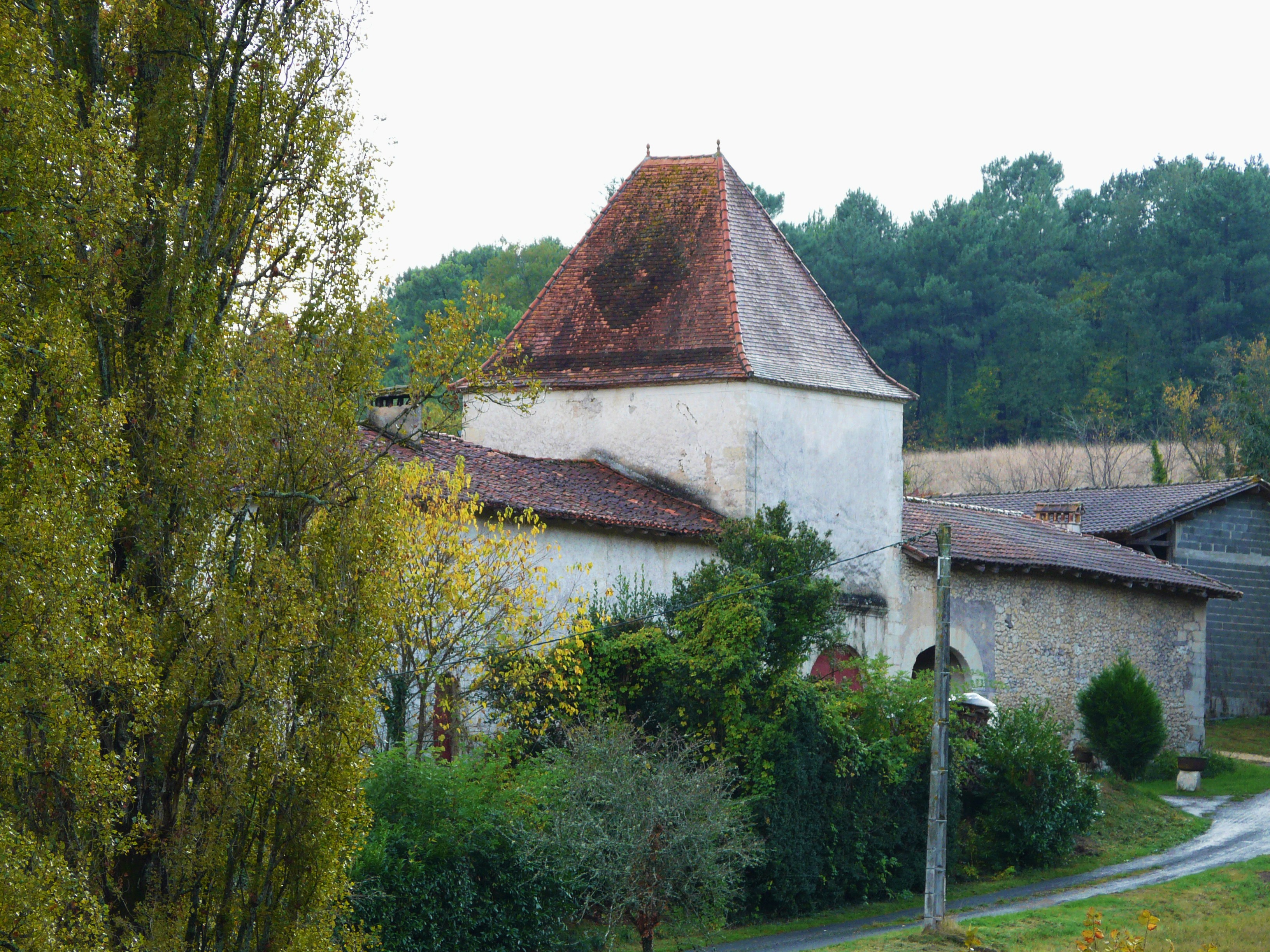 La Benéchie, Mensignac, Dordogne, France